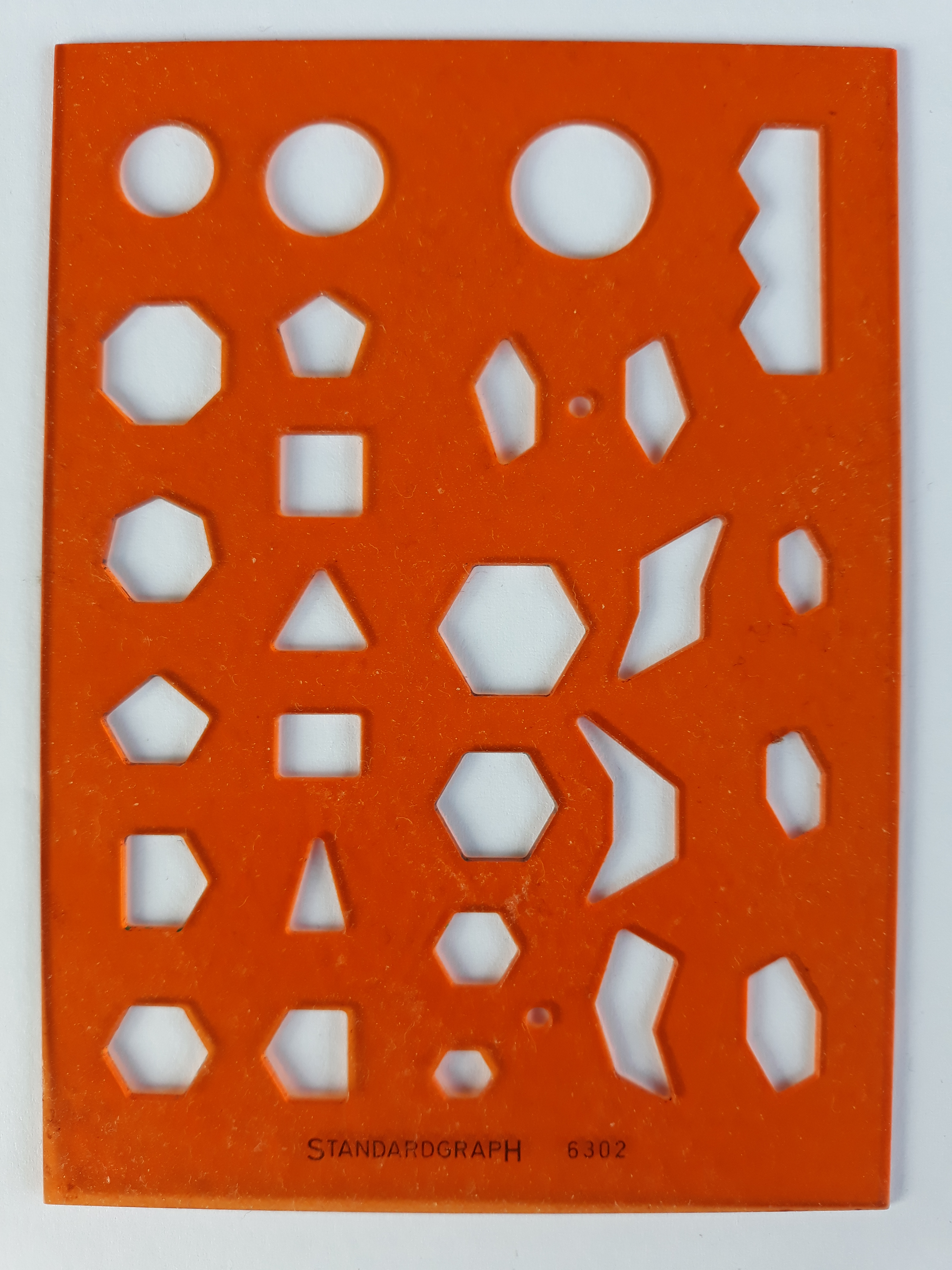 Zeichenschablone Chemie